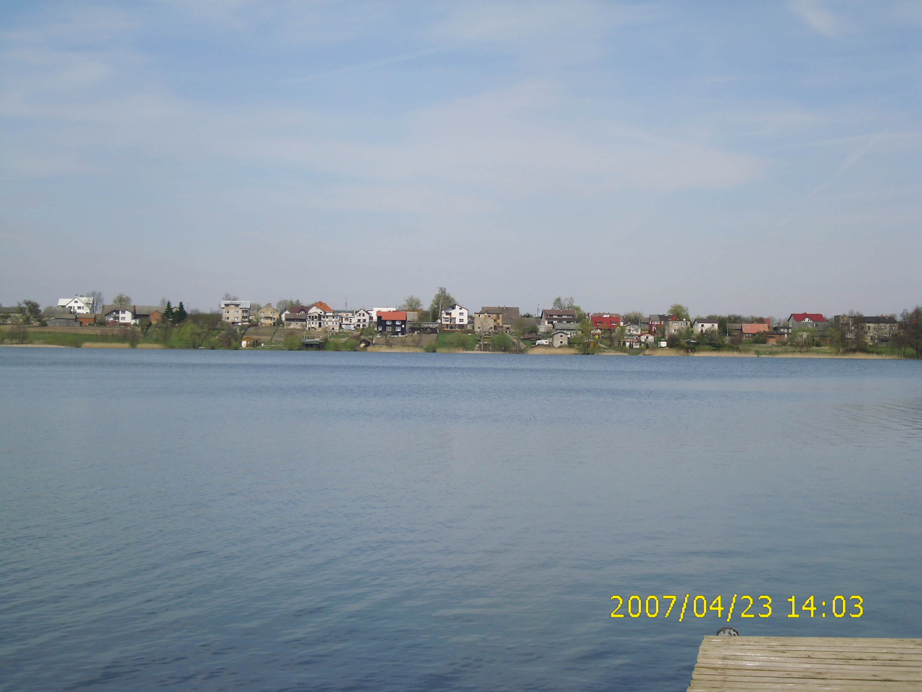 Panorama miejscowości Wiele, widok na ulicę Derdowskiego z przeciwnego przegu jeziora Wielewskiego.